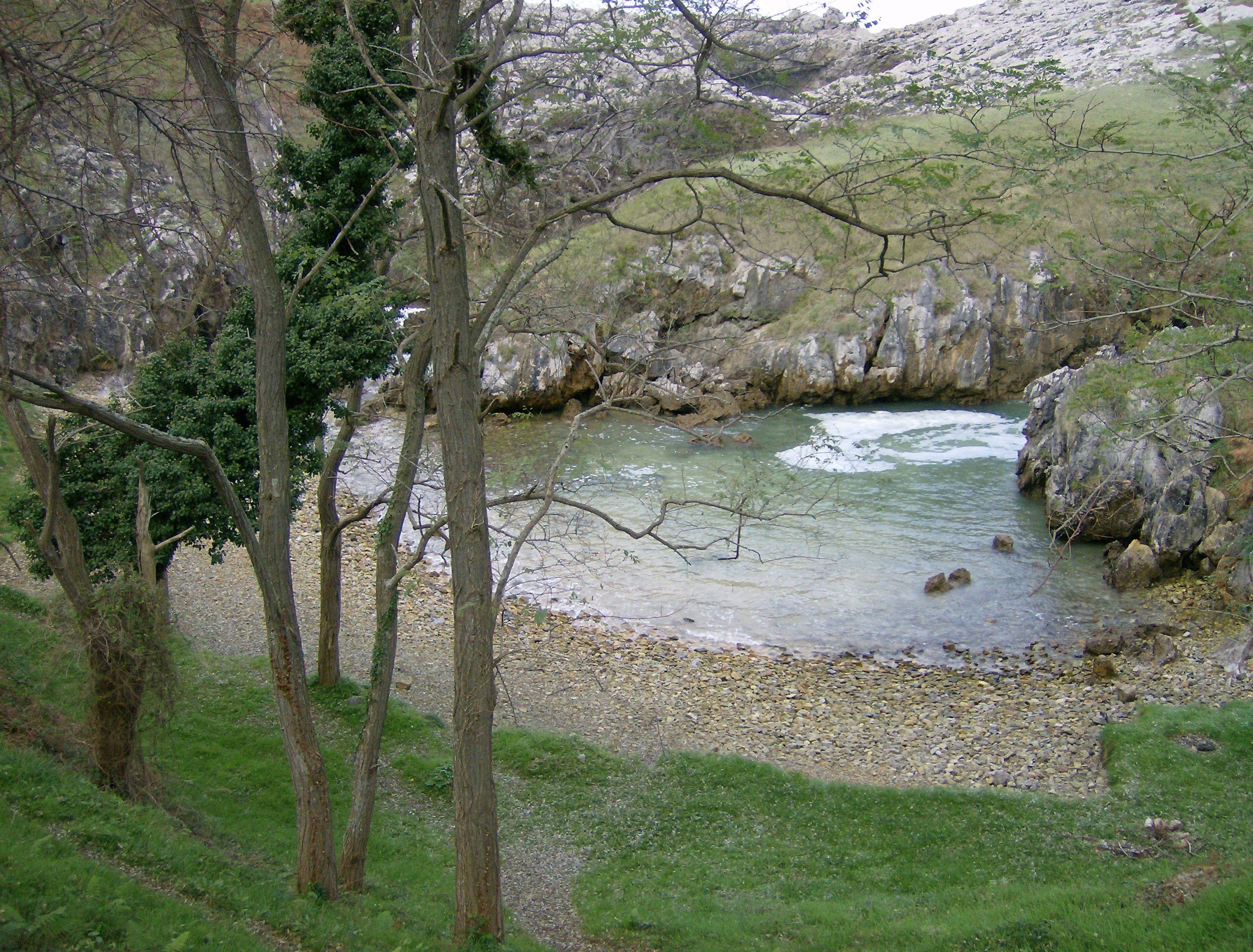 Playa Cobijeru